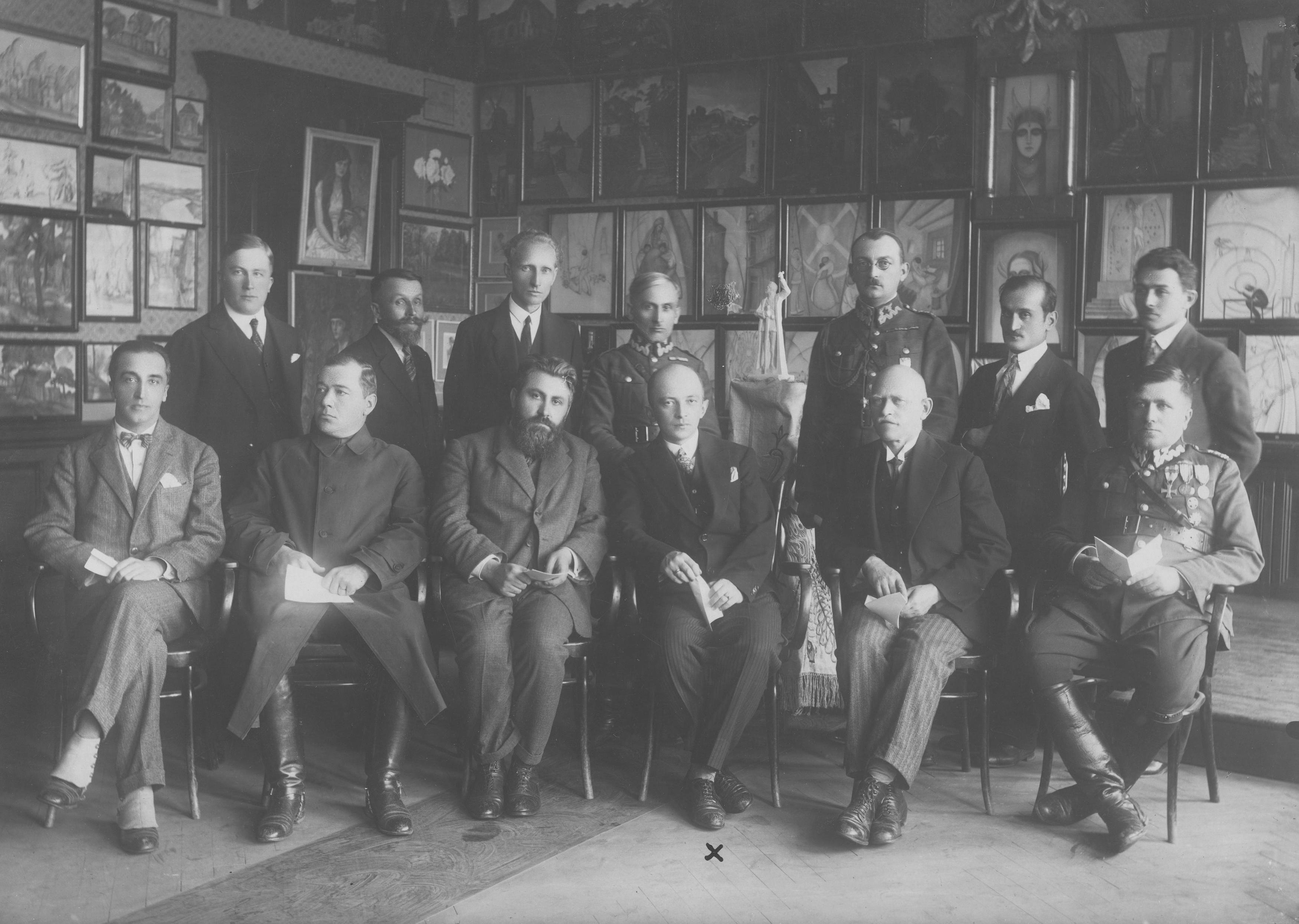 Wystawa sztuki w Sanoku. ks. Władysław Lutecki, Maksymilian Freund, Władysław Lisowski, Romuald Klimow (x), Józef Sitarz, Maksymilian Brożek, Leon Getz.